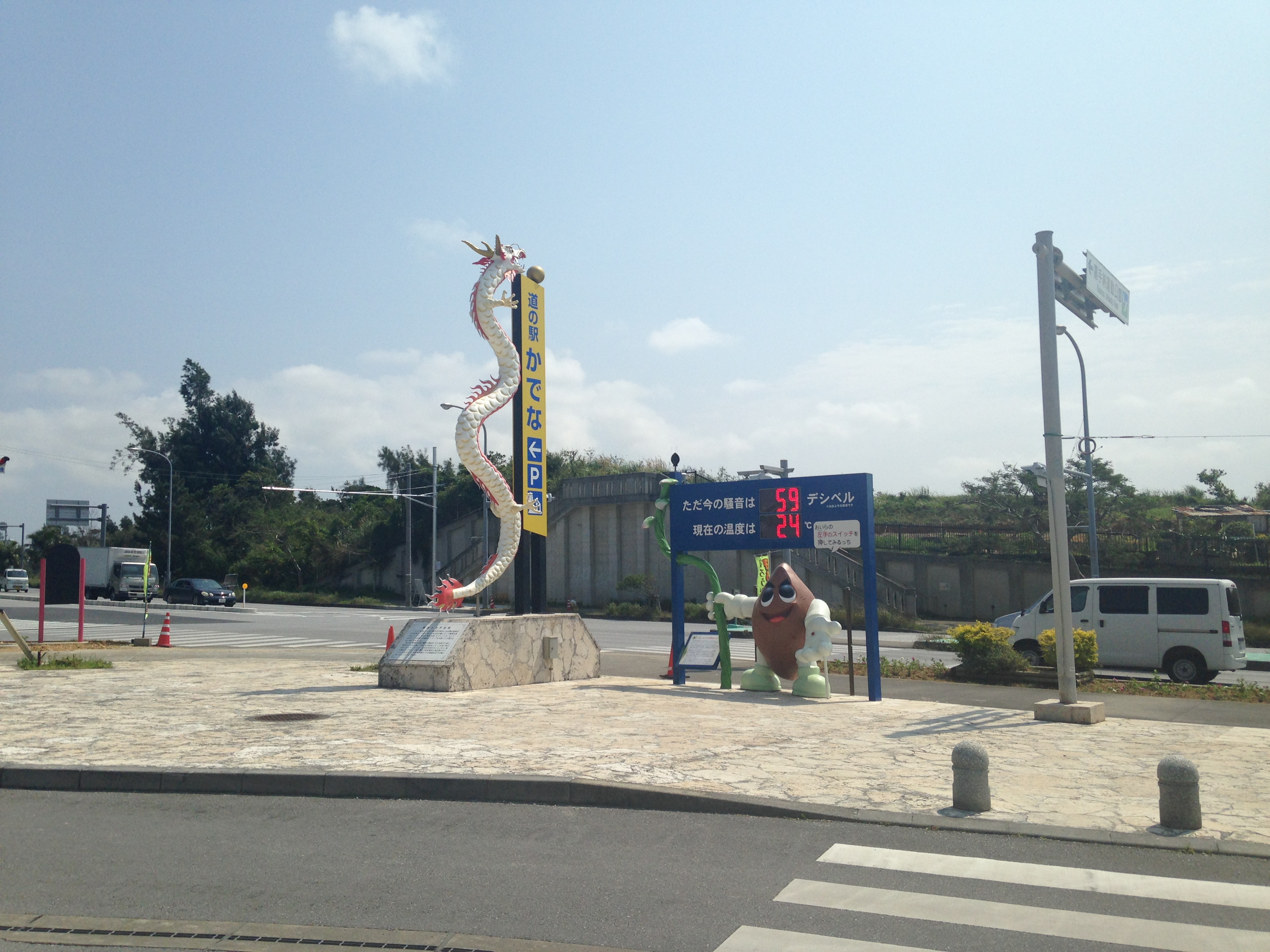 道の駅かでな前の白龍像とボード型の騒音計・温度計